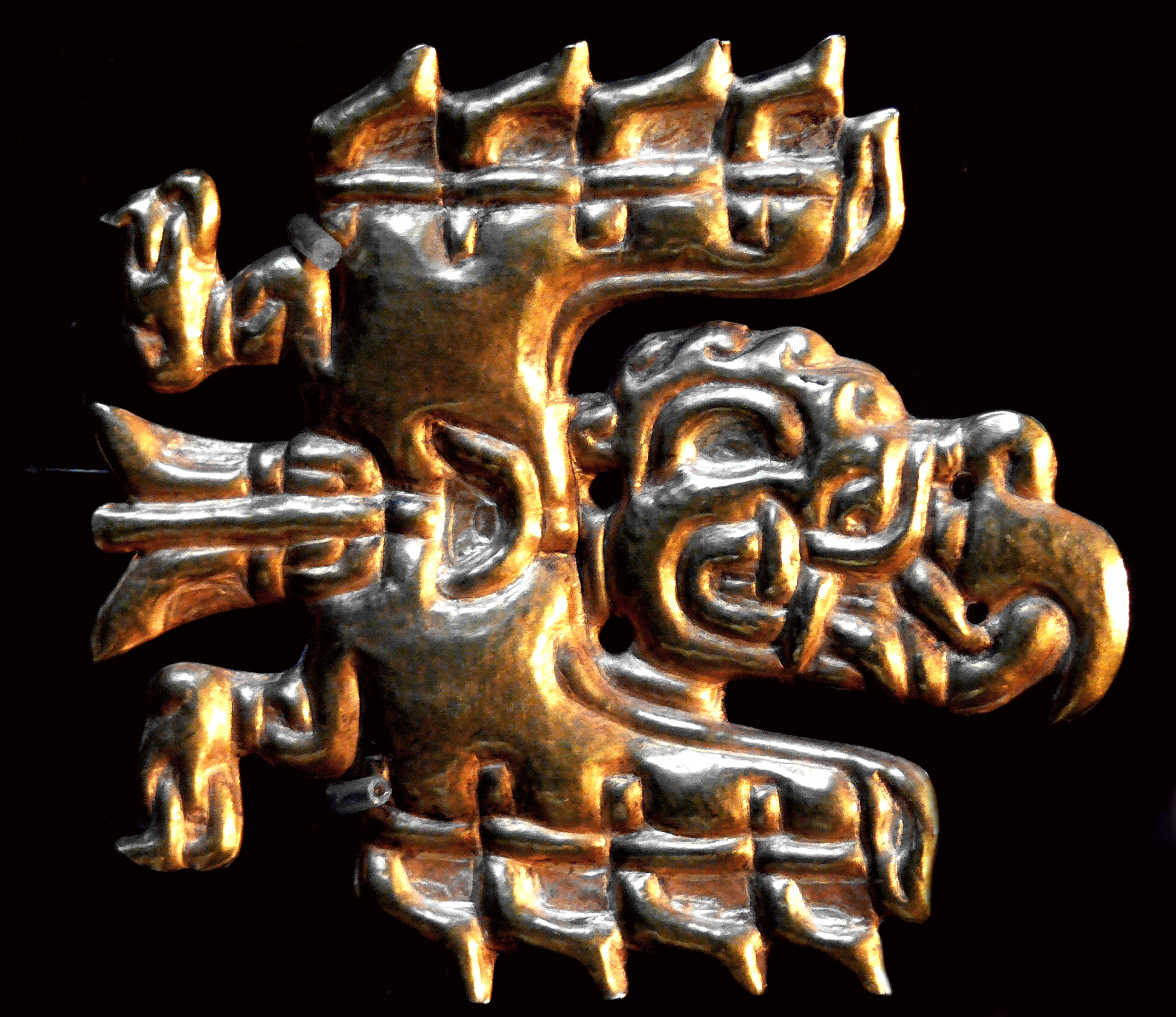 Schaffhausen, Museum zu Allerheiligen, Sammlung Ebnöther (Abteilung „Mensch/Tier“) Goldapplike in Form eines mythischen Kondors oder Adlers, Höhe 6,4 cm, Breite 7,1 cm; Nordperu, Chavin, 900–300 v. Chr.